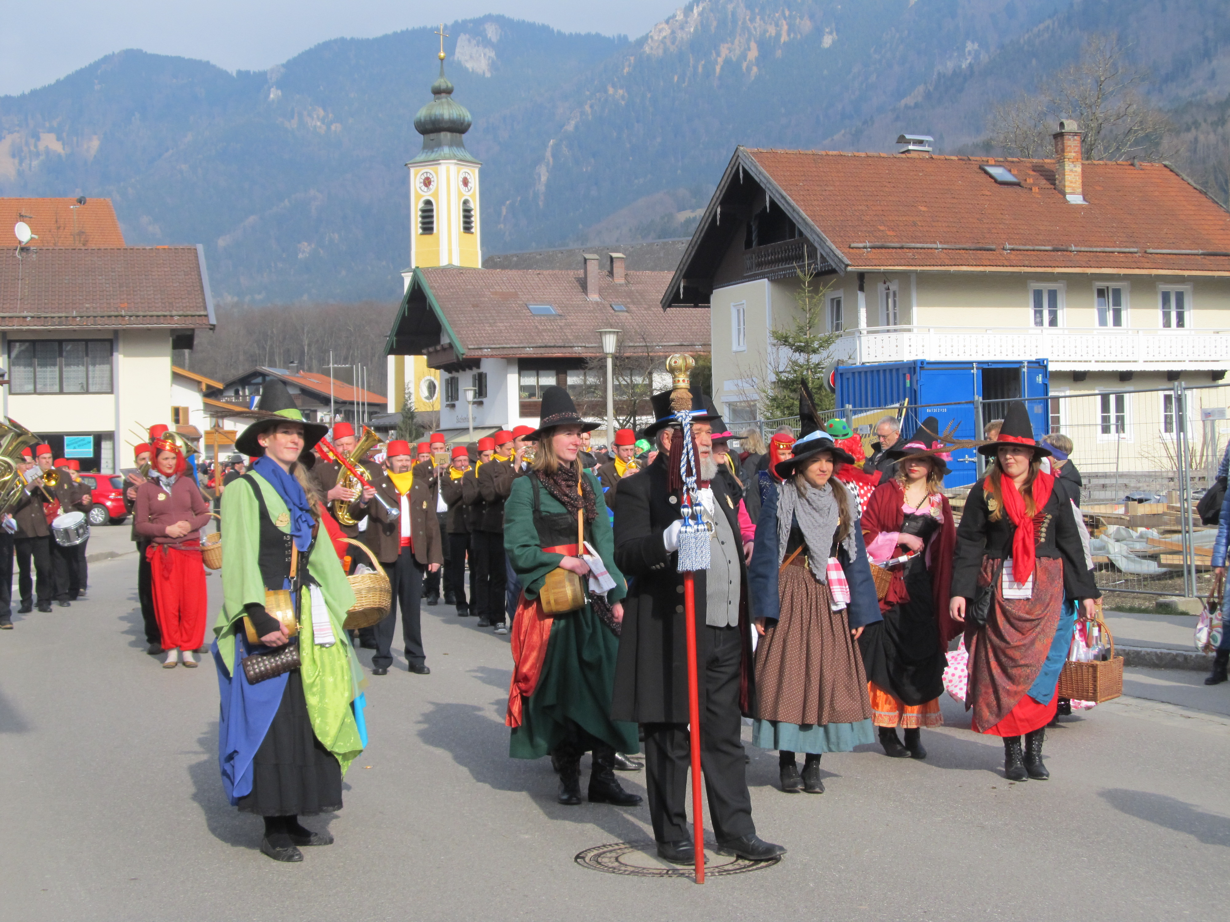 Wössner Seeräuberspiel 2014